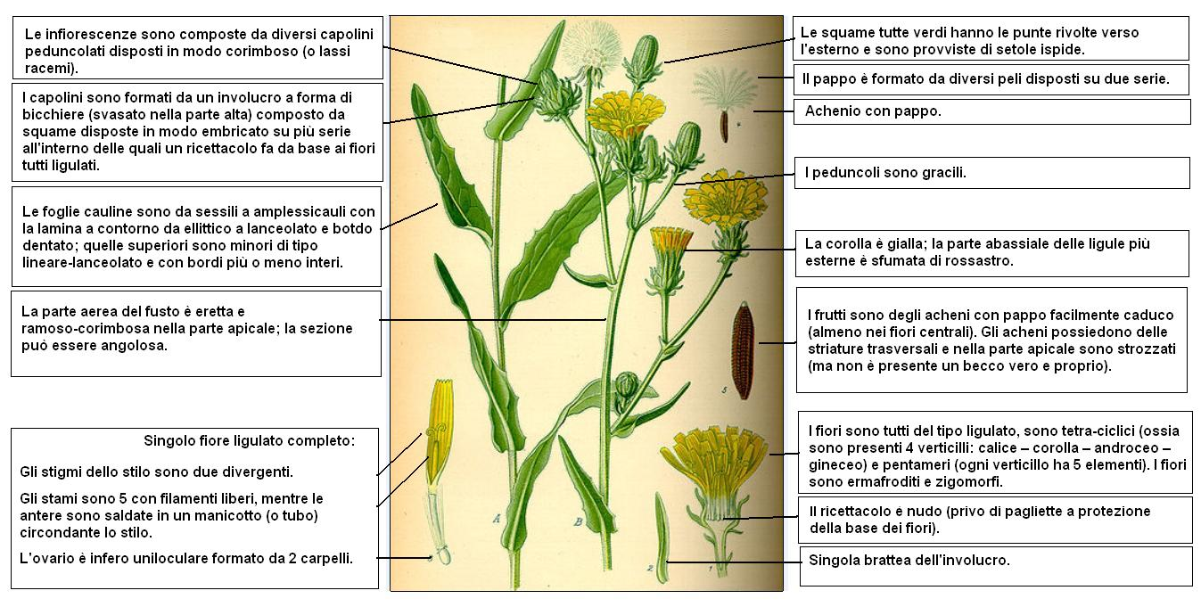 Picris hieracioides Thome DESC